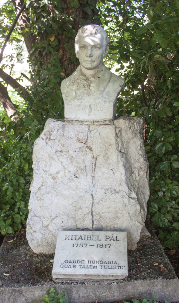 Bust of Pál Kitaibel by János Kopitslabel QS:Len,"Bust of Pál Kitaibel by János Kopits" label QS:Lhu,"Kitaibel Pál mellszobra a Füvészkertben, Kopits János alkotása"